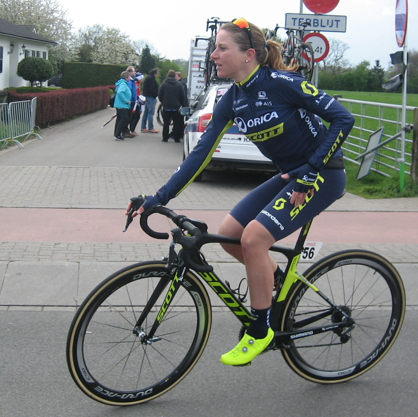 Na de finish van de Amstel Gold Race Ladies Edition 2017.